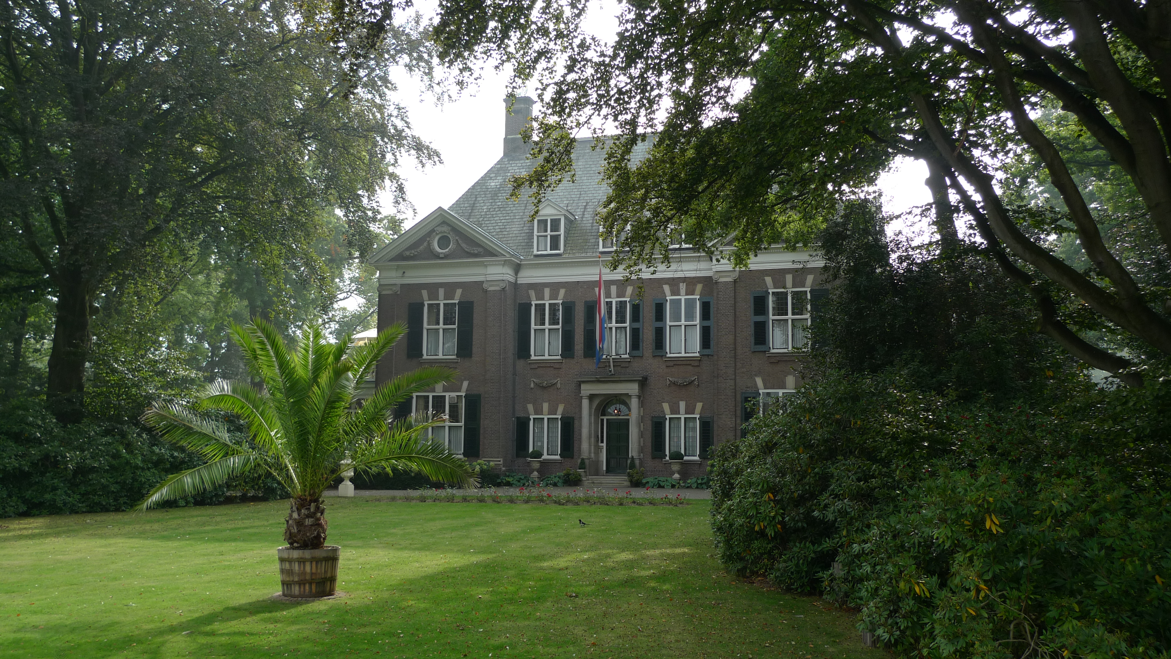 Villa De Laak bij daglicht, Nederlands rijksmonument nr. 518761